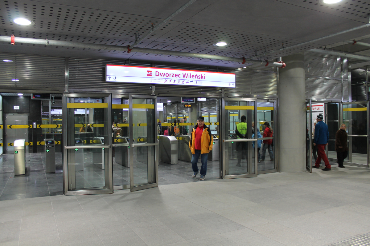 Wschodnia hala odpraw stacji C15 Dworzec Wileński.